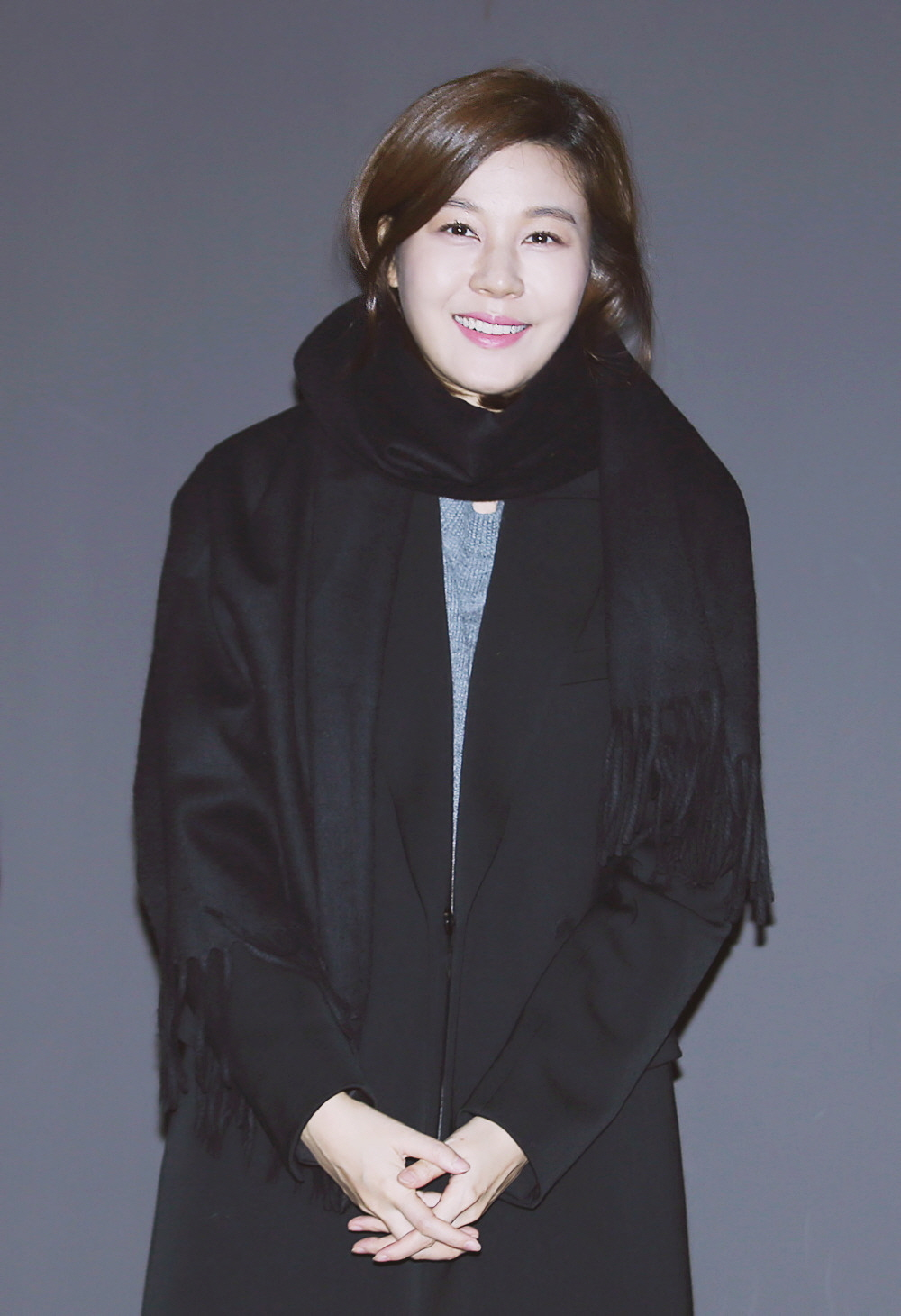 170107 여교사 무대인사 김하늘 유인영 이원근